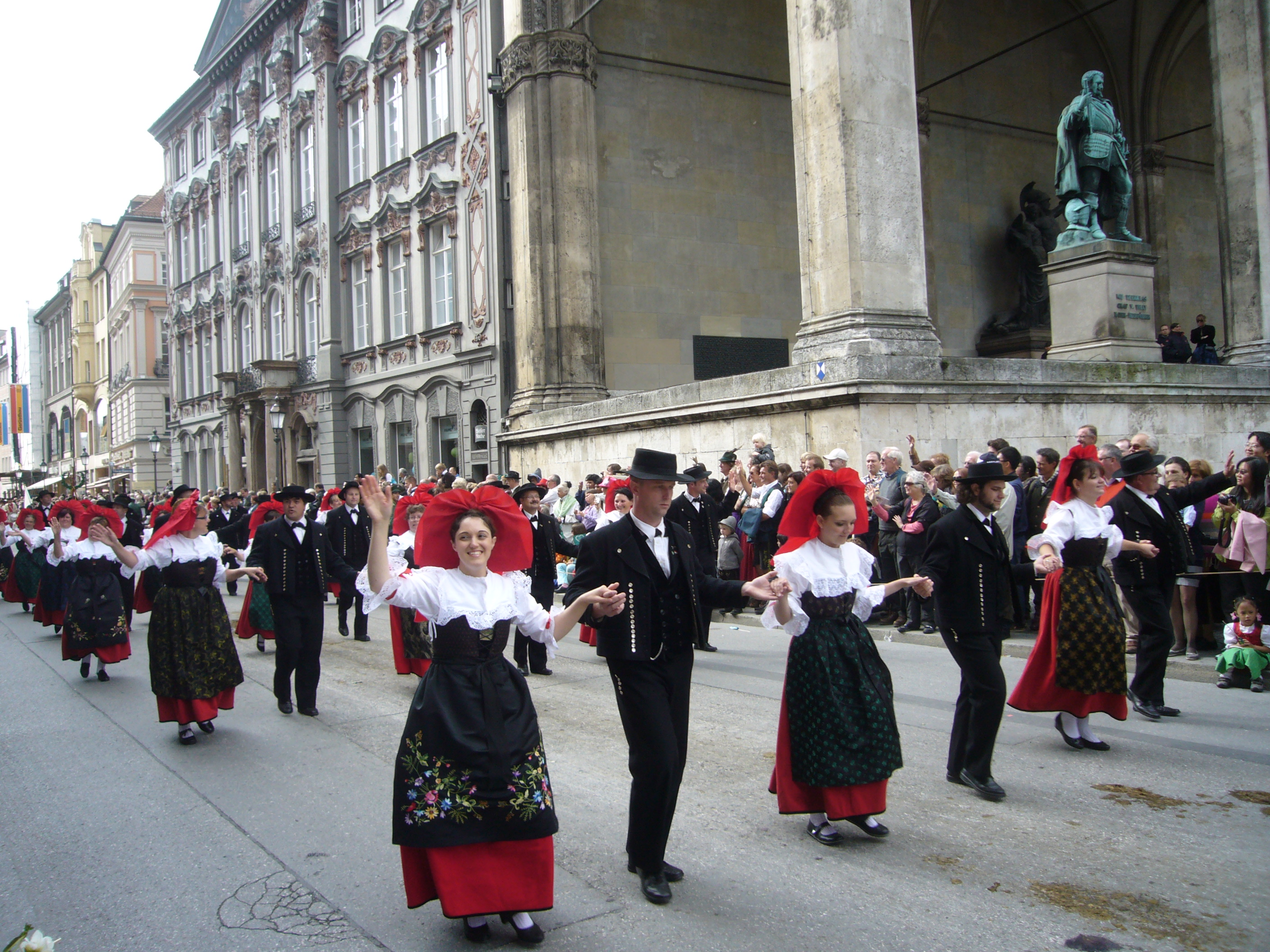 Elsässer Tracht aus Geispolsheim; Trachtenumzug zum Oktoberfest 2012 in München an der Feldherrnhalle